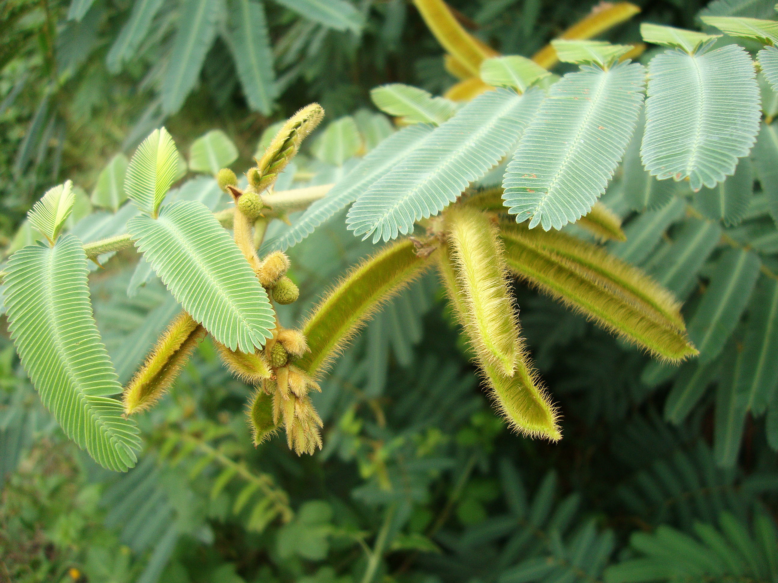 Mimosa pigra L., 1759